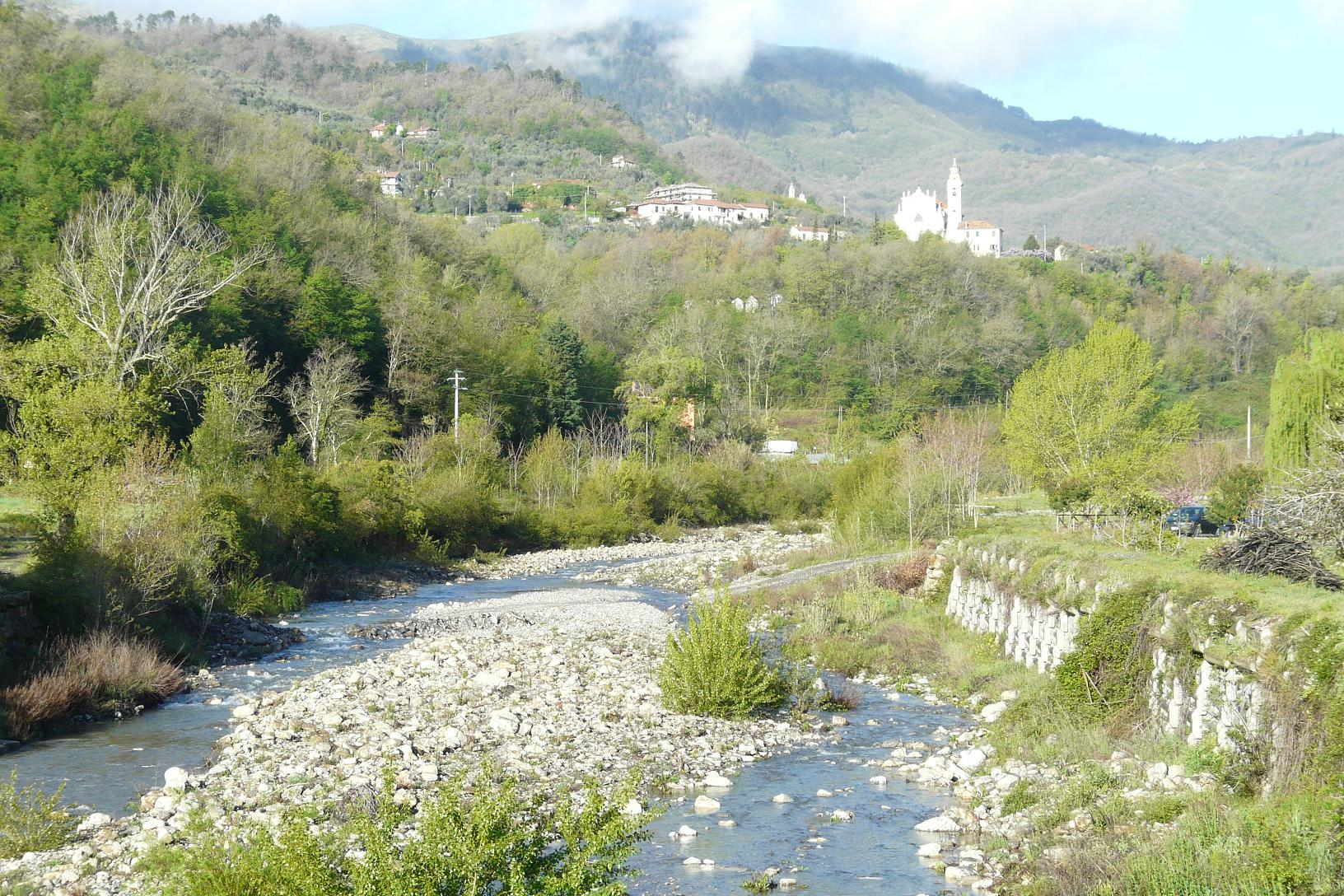 Chiesa dei S.S. Vincenzo e Anastasio, Stellanello, Liguria, Italia